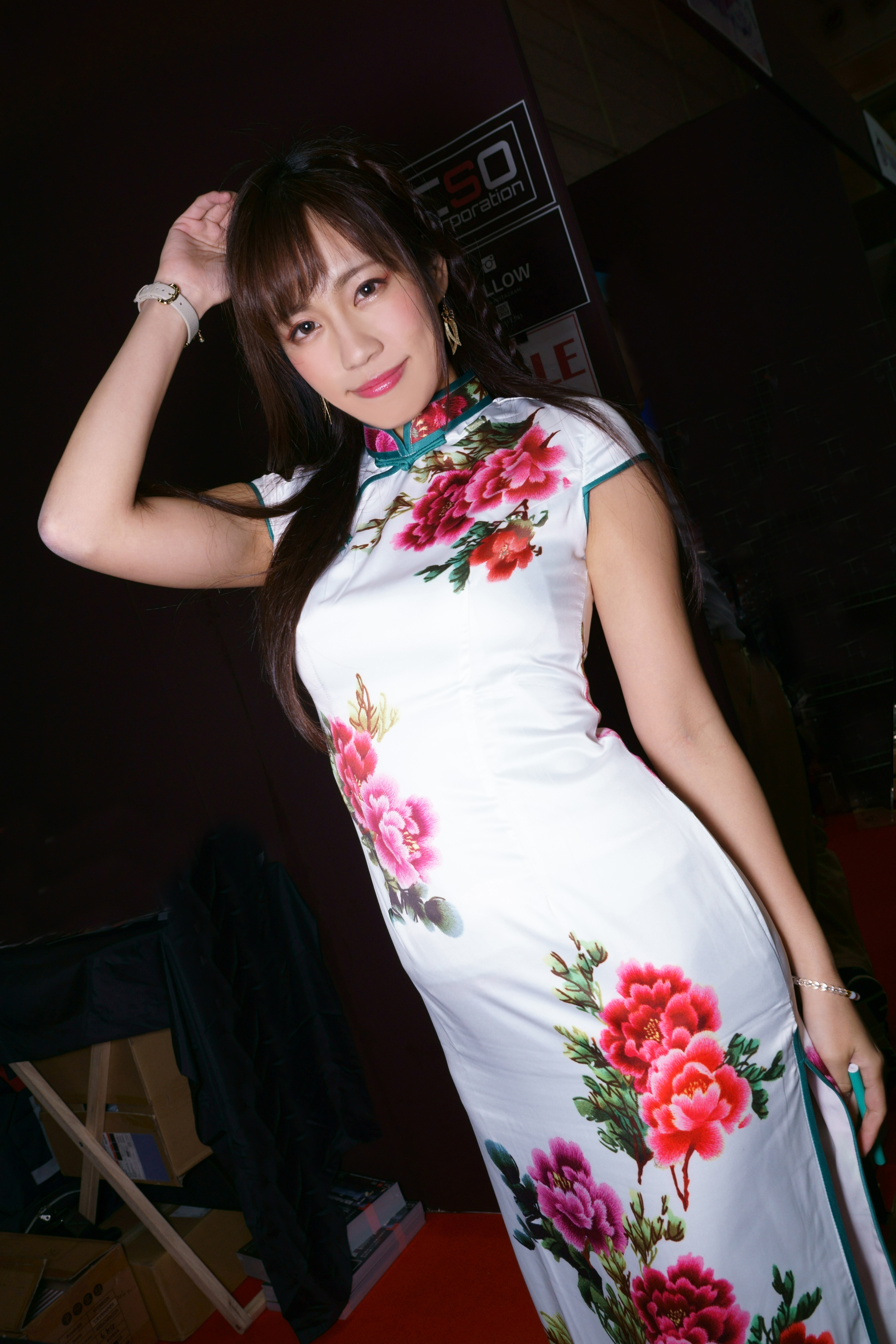 Seiko_Kirishima190112-01